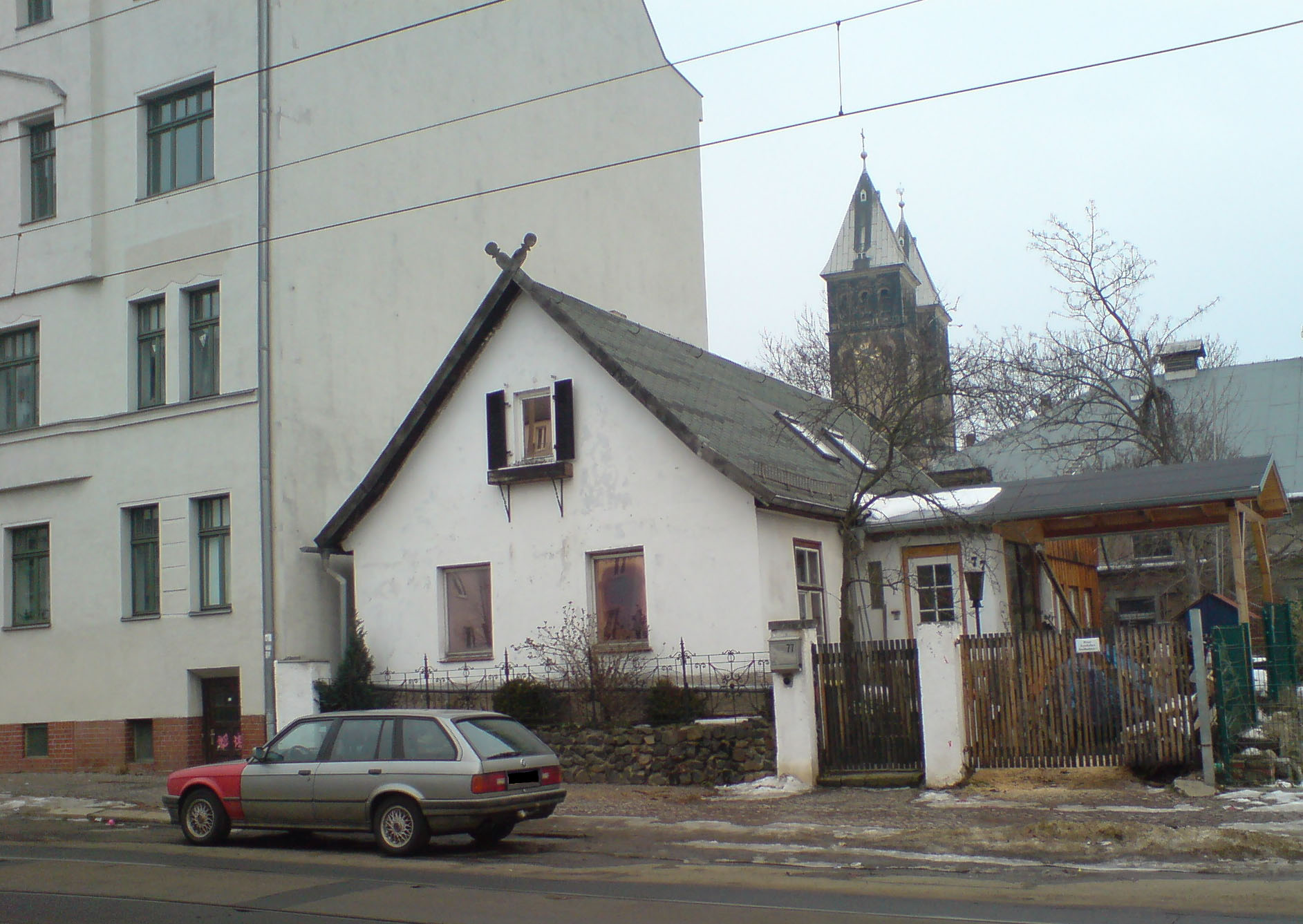 verschieden hohe Häuser in der Dieskaustraße